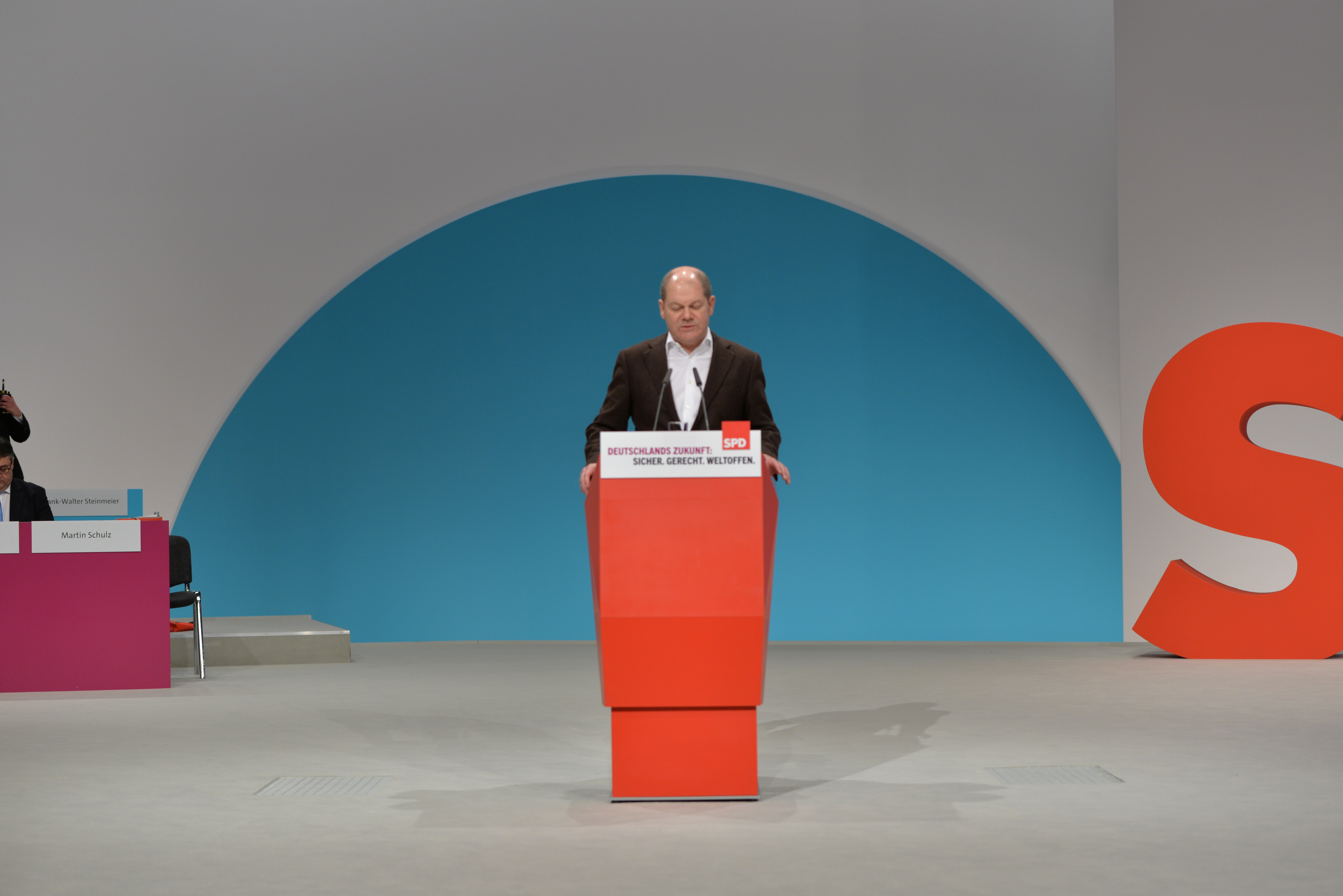 Olaf Scholz auf dem SPD Bundesparteitag Berlin, 10.-12. Dezember 2015, CityCube, Messe Berlin